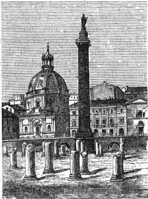 Foro e colonna di Traiano - Immagine dal libro: Adone Palmieri, Colpo d'occhio a Roma, Tipografia Chiassi, Roma, 1862